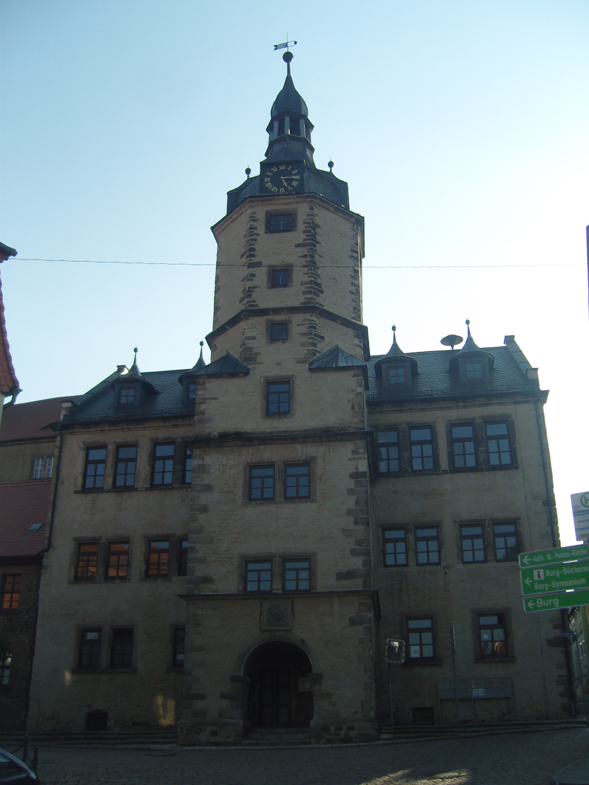 Rathaus Wettin